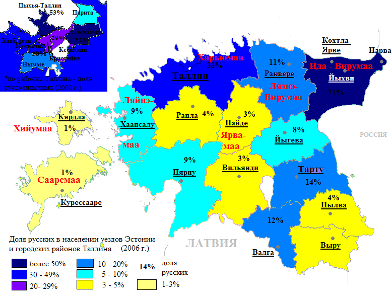 этнокарта уездов Эстонии